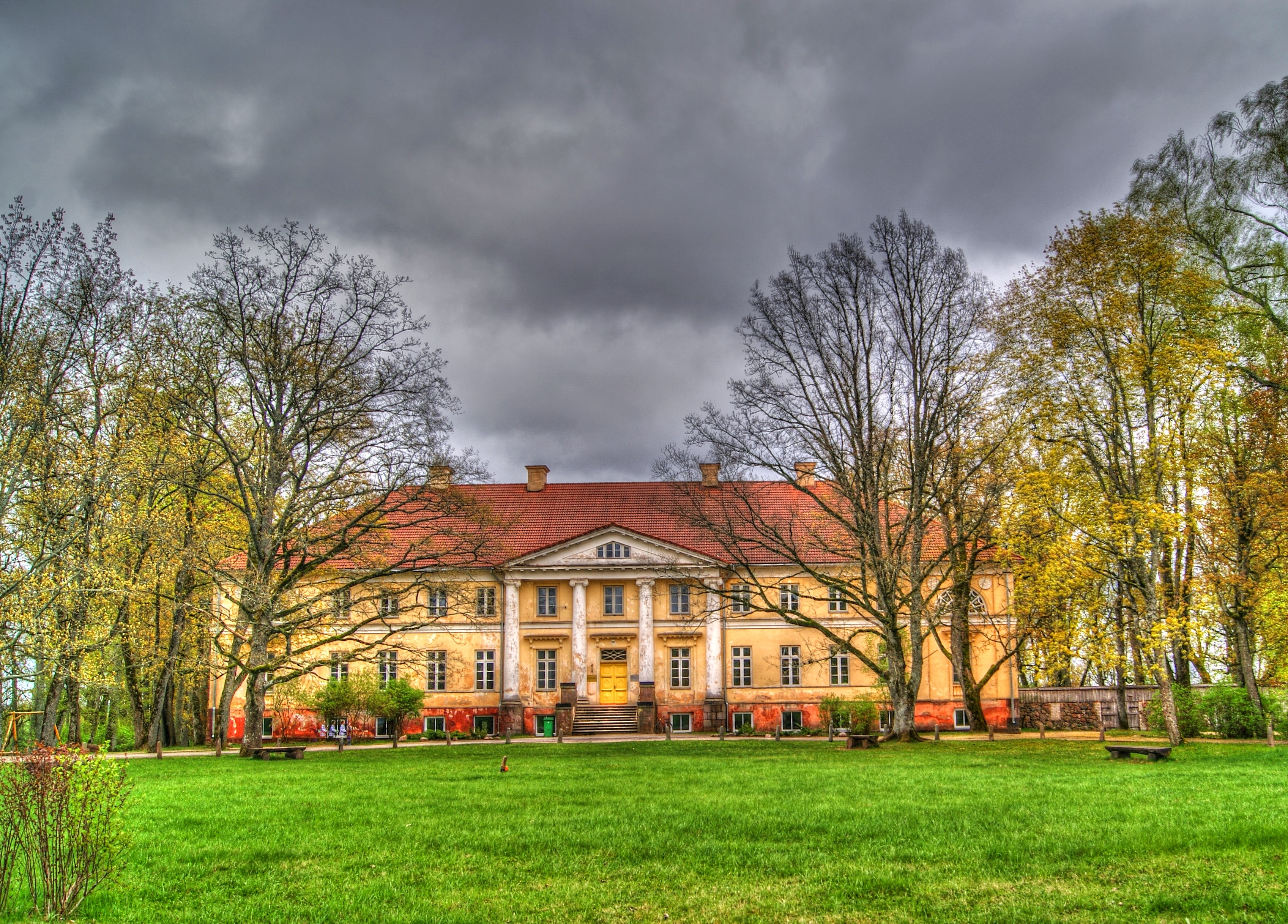 Snēpeles muižas pils